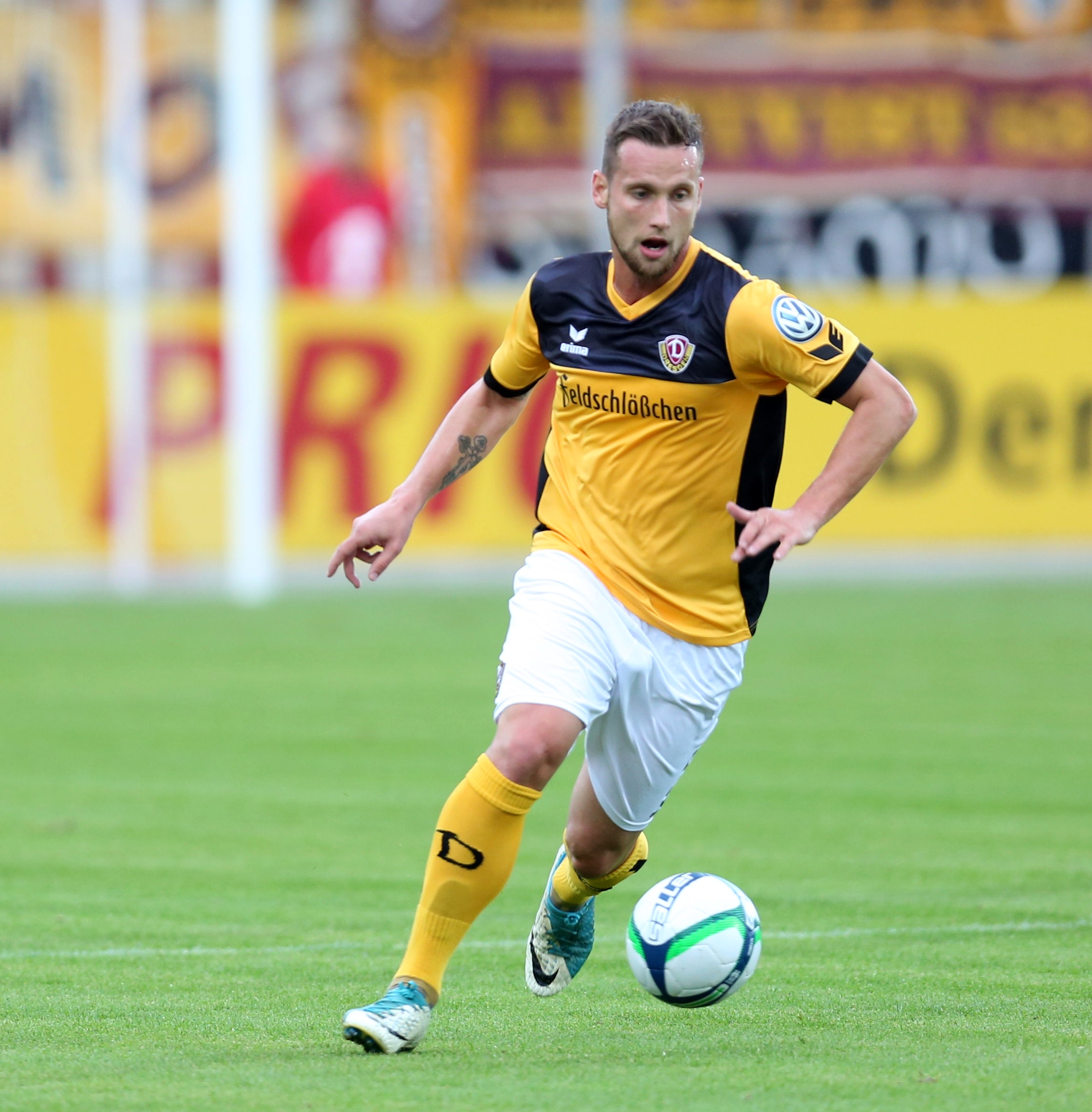 DFB-Pokal 2017/18, 1. Hauptrunde, TuS Koblenz gegen SG Dynamo Dresden: Manuel Konrad (SG Dynamo Dresden)